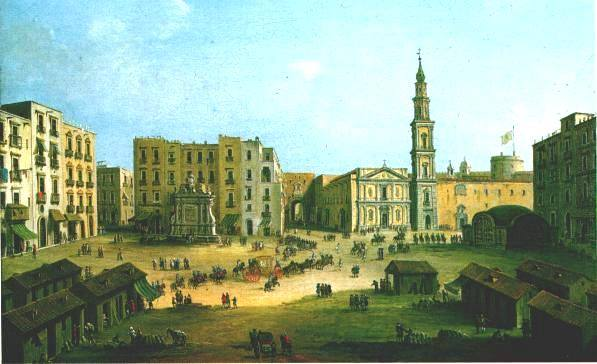 Napoli - Veduta di Piazza Mercato con Chiesa del Carmine. Dipinto di Antonio Joli. Luogo di esposizione sconosciuto.